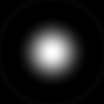 דיסקת איירי